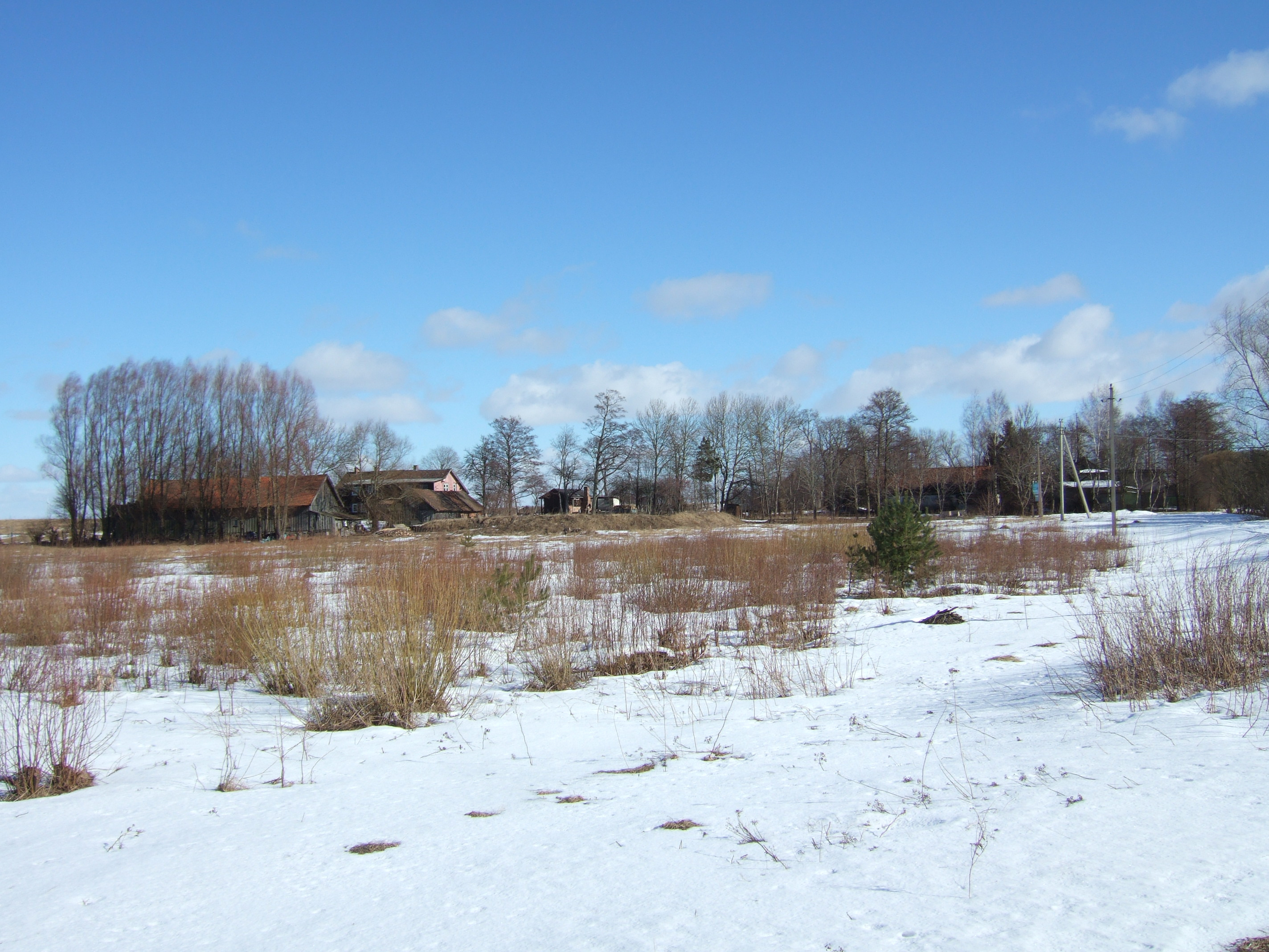 Nemirsetos kaimas žiemą